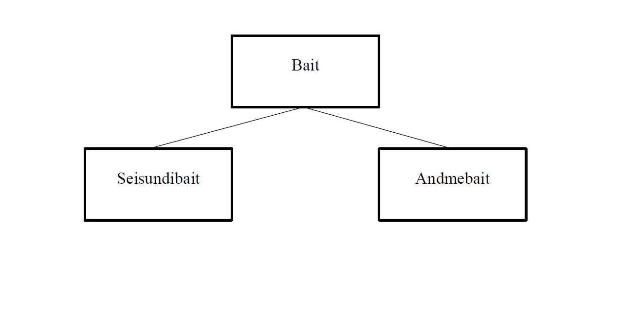 MIDI baiditüüpide diagramm